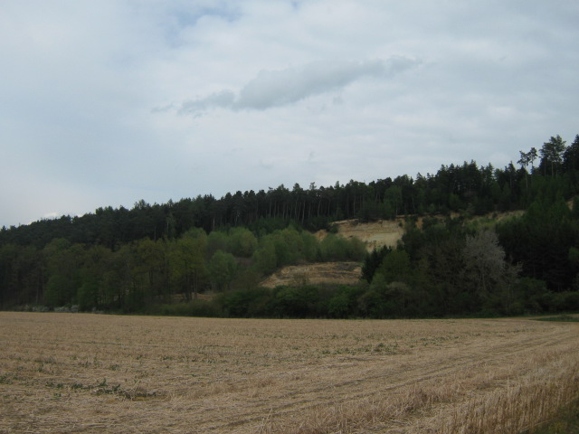 Ehemalige Kiesgrube am rechten Steilhang des Teisbachtals gegenüber von Maßendorf, Gemeinde Loiching, heute Geotop